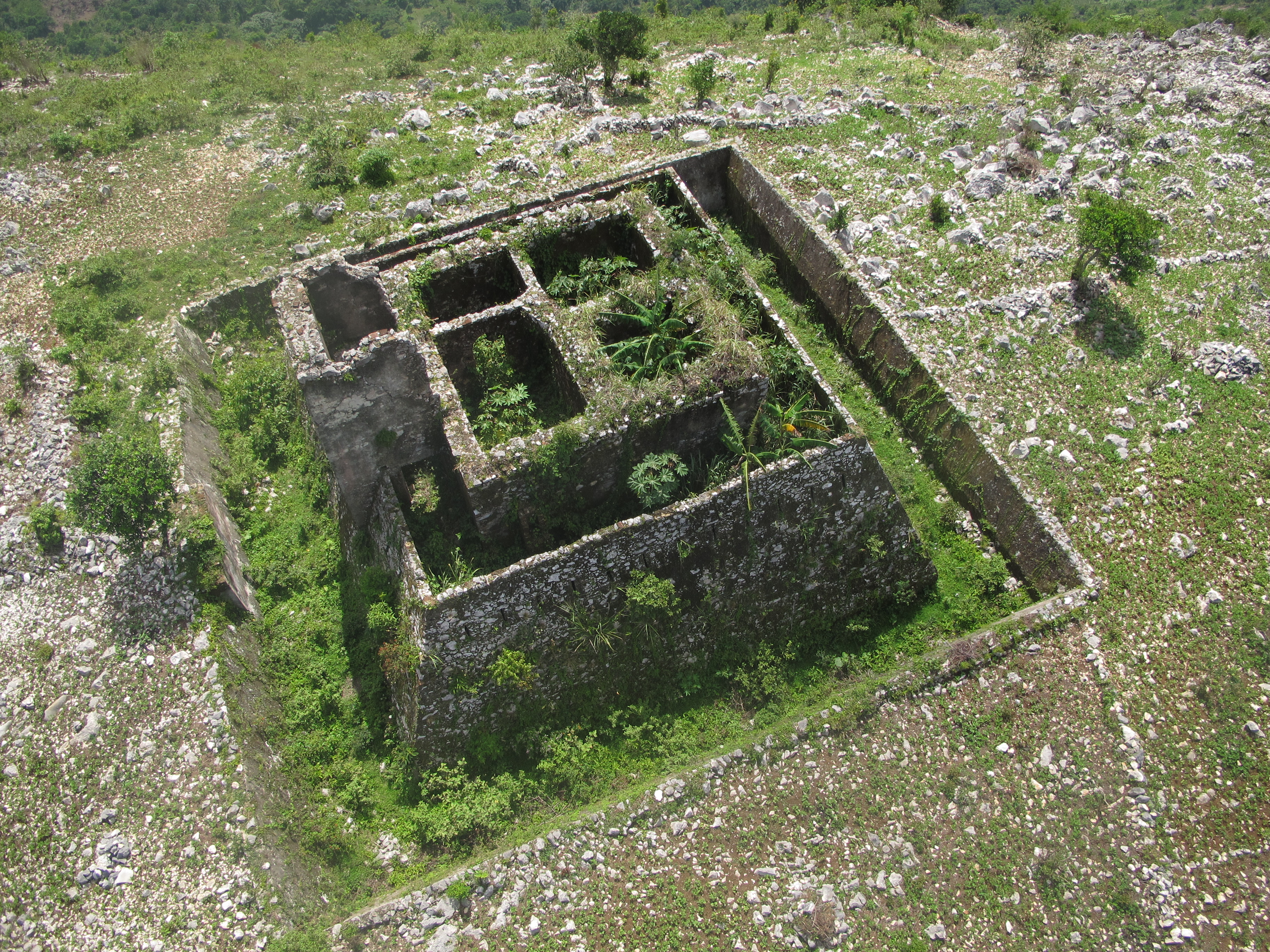 Tour défensive aux environs de la citadelle du roi Henri Christophe